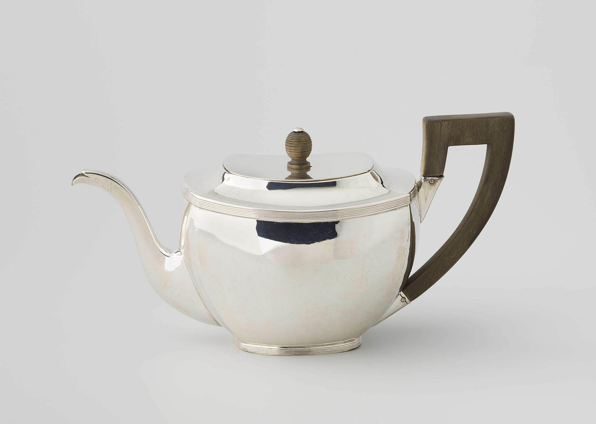 IdentificatieTitel(s): Theepot, afgerond rechthoekig, met filetrandenObjecttype: theepot Objectnummer: BK-1978-134Opschriften / Merken: kantoorteken, onderzijde deksel, afgeslagen: Minervakop met A (Kantoorteken Amsterdam.)gehalteteken, achterzijde pot, afgeslagen: klimmende leeuw met 1 (1ste gehalte (934/000))jaarletter, onderzijde bodem, afgeslagen: ‘M’ (1821)meesterteken, achterzijde pot, onderzijde bodem en onderzijde deksel, afgeslagen: DH boven haas in ruit (Verantwoordelijksheidtekens, nr. 52054, niet in Meestertekens) (Jean Anthoine de Haas.)Omschrijving: De afgerond rechthoekige pot heeft een zich verbredend bolwandig lichaam dat rust op een rechte basis. Het is aan de zijkanten iets verhoogd. Rond de basis en langs de bovenzijde van het lichaam lopen filetranden. De hals is gewelfd. De pot heeft een S-vormig gebogen tuit en een hoog ebbenhouten oor dat aan de bovenzijde twee rechte hoeken vertoont en zilveren vattingen heeft. Het gladde deksel heeft een hoge, bolvormige, geribde ebbenhouten knop, aan de bovenzijde afgedekt door een zilveren plaatje.VervaardigingVervaardiger: zilversmid: Jean Anthoine de HaasPlaats vervaardiging: AmsterdamDatering: 1821Materiaal: zilver ebbenhout Afmetingen: h 11,8 cm. × b 24,2 cm. × d 9,8 cm. × g 418 grVerwerving en rechtenCredit line: Schenking van de heer en mevrouw Jaffé-Pierson, HuizenVerwerving: schenking 1978Copyright: Pubkiek domein